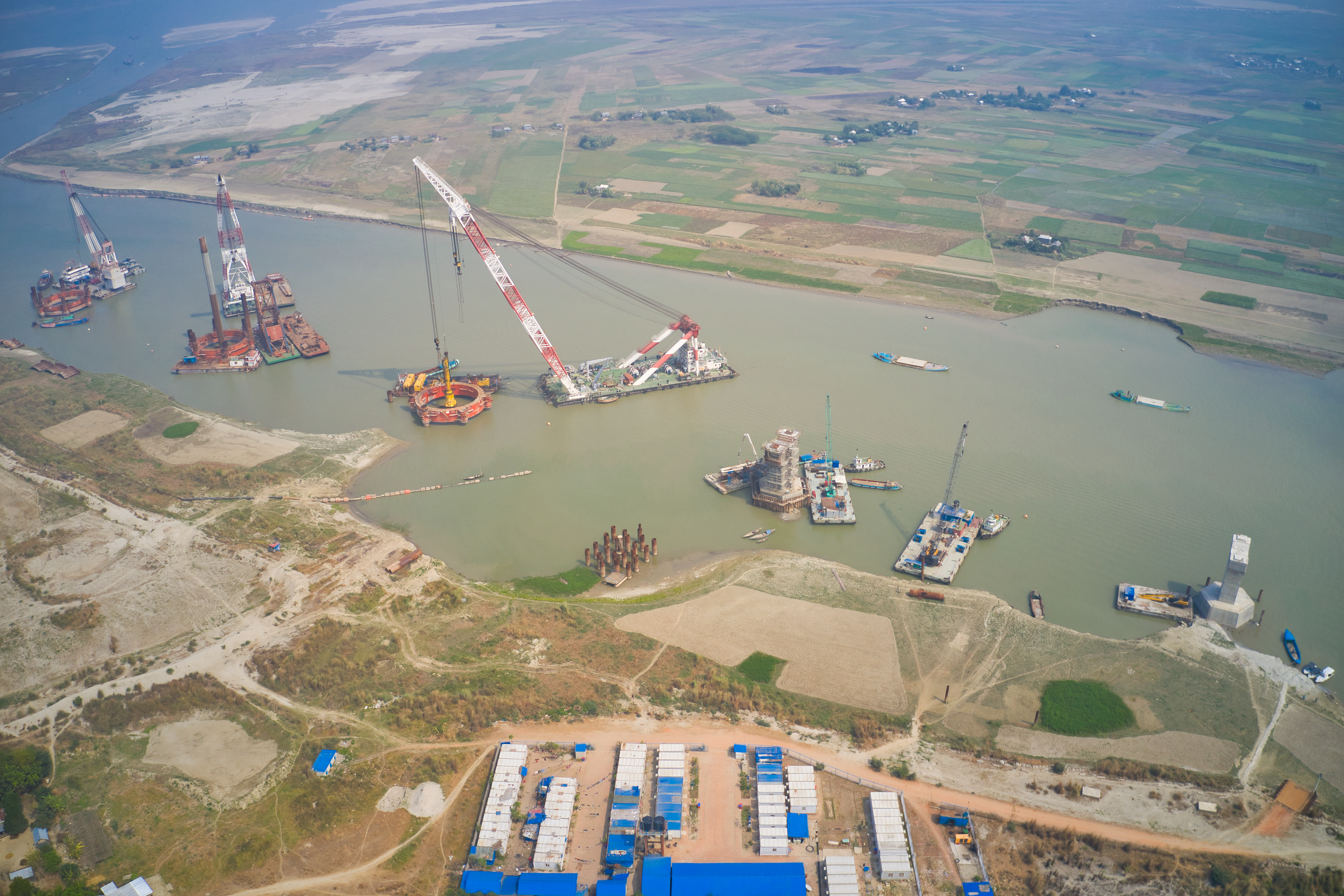 পদ্মা সেতু